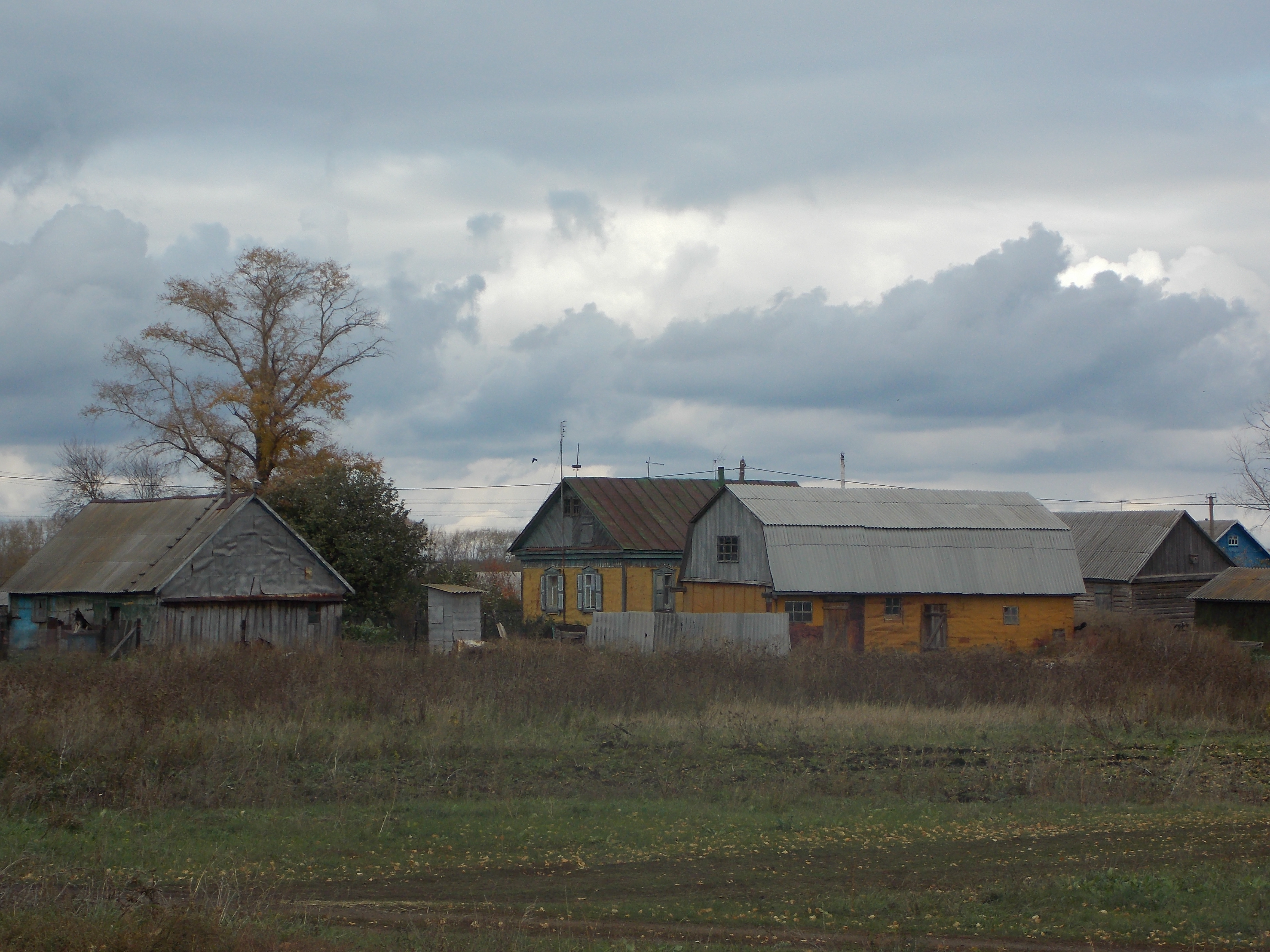 Деревня Алексеевка, Благоварский район, Башкирия